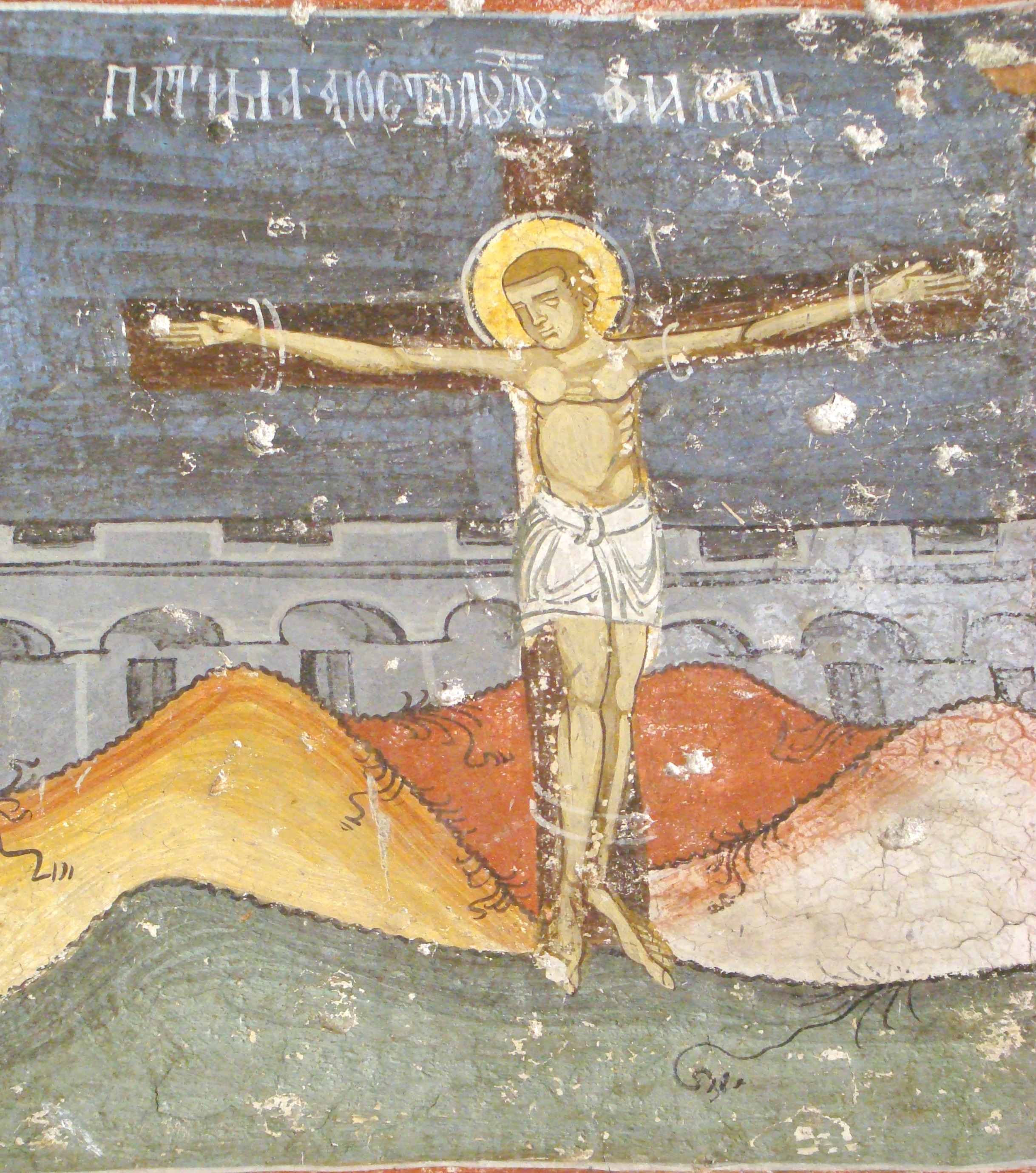 Ansamblul bisericii "Sf. Ioan Botezătorul"